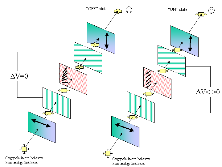 zelf geconstrueerd